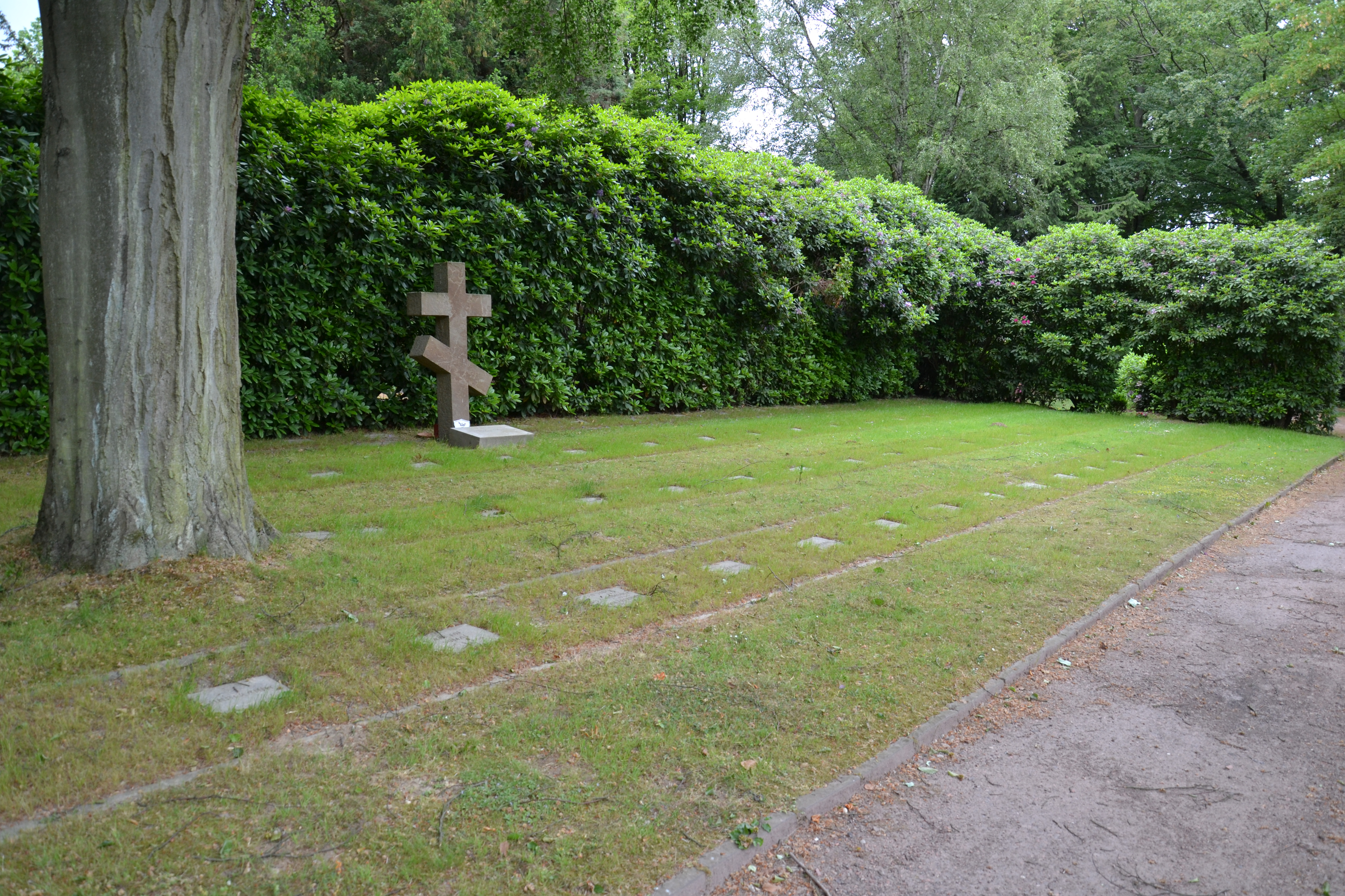 Grabfeld für Opfer des 2. Weltkrieges auf dem Südwestfriedhof in Essen